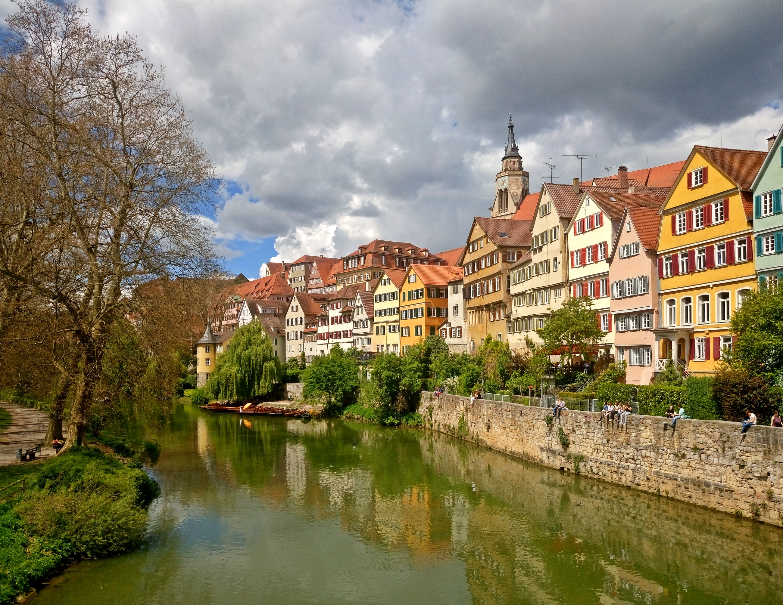 Die Neckarfront in Tübingen, Baden-Württemberg.